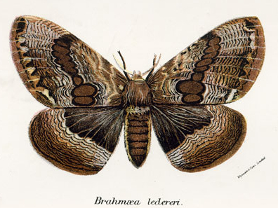 Brahmaea ledereri